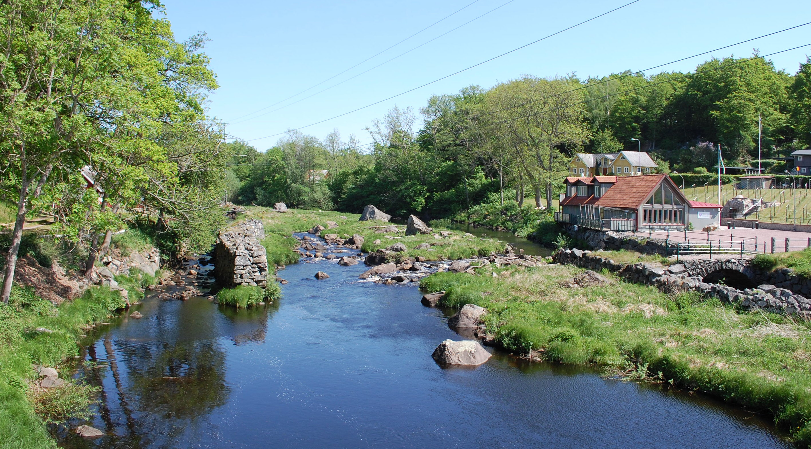 Fluss Helge å in Torsebro